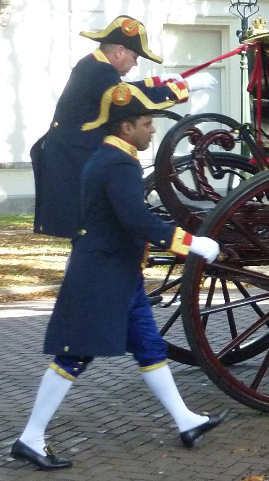 Koninklijke Lakeien in Den Haag